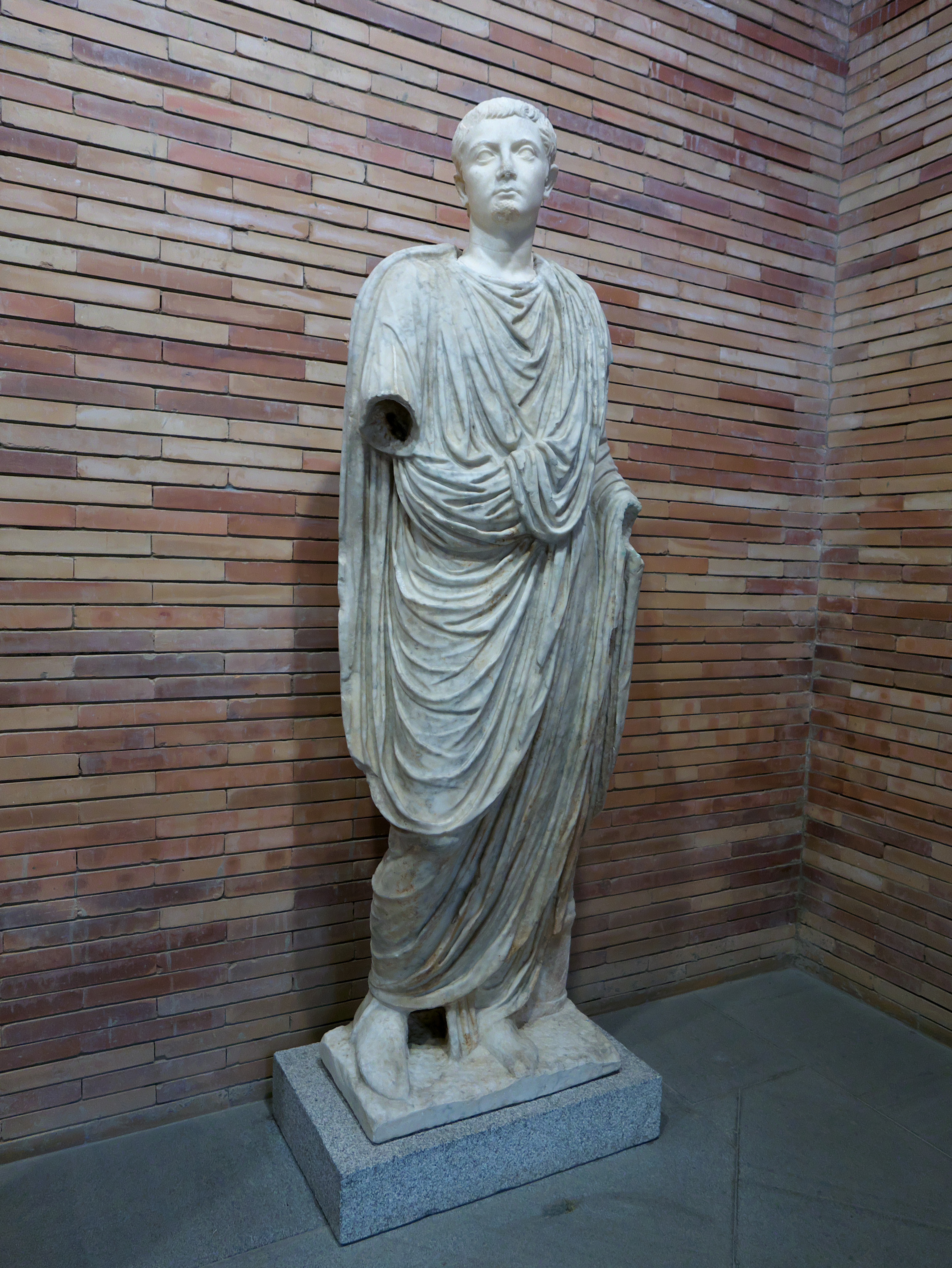 Tiberio Julio César (4 a.C.-14 d.C.), mármol, Aula Sacra del peristilo del Teatro de Mérida.